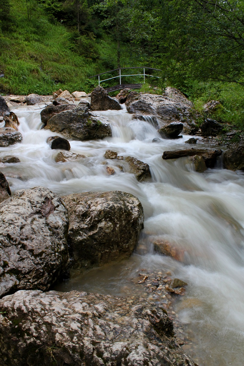 Malowniczy potok płynący przez Wąwóz Homole